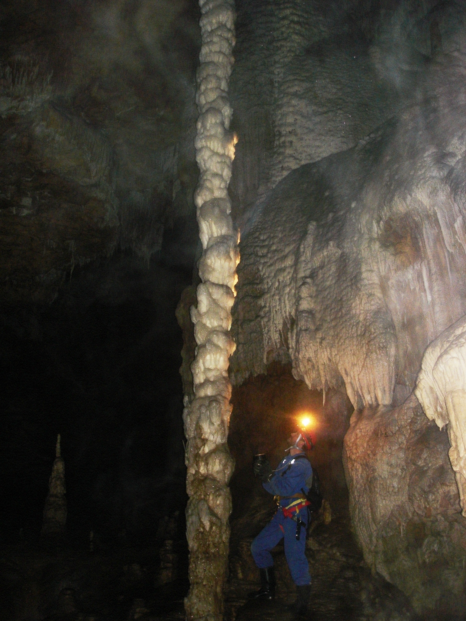 Vražiji firovi